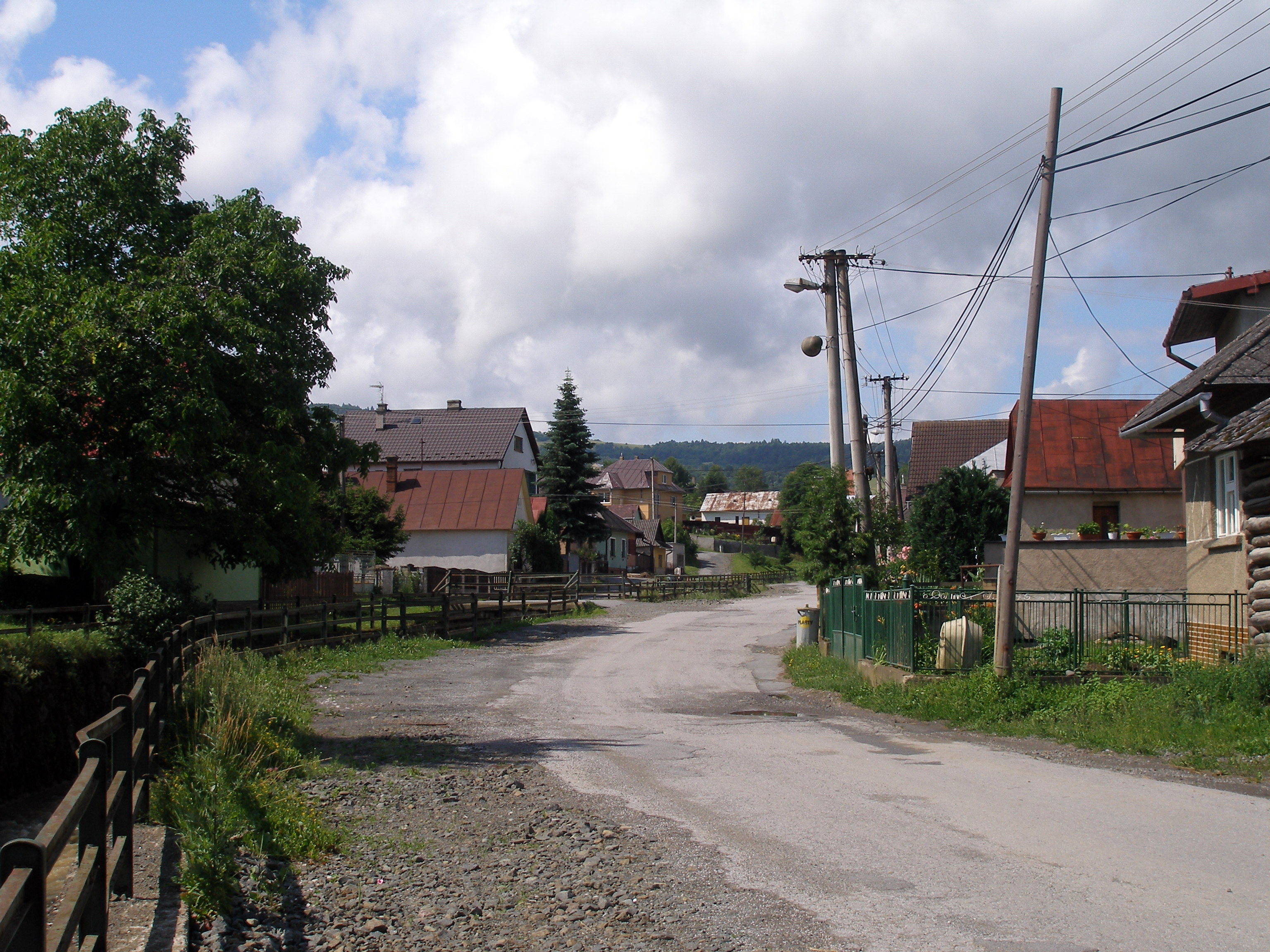 Obec Ďačov okres Sabinov